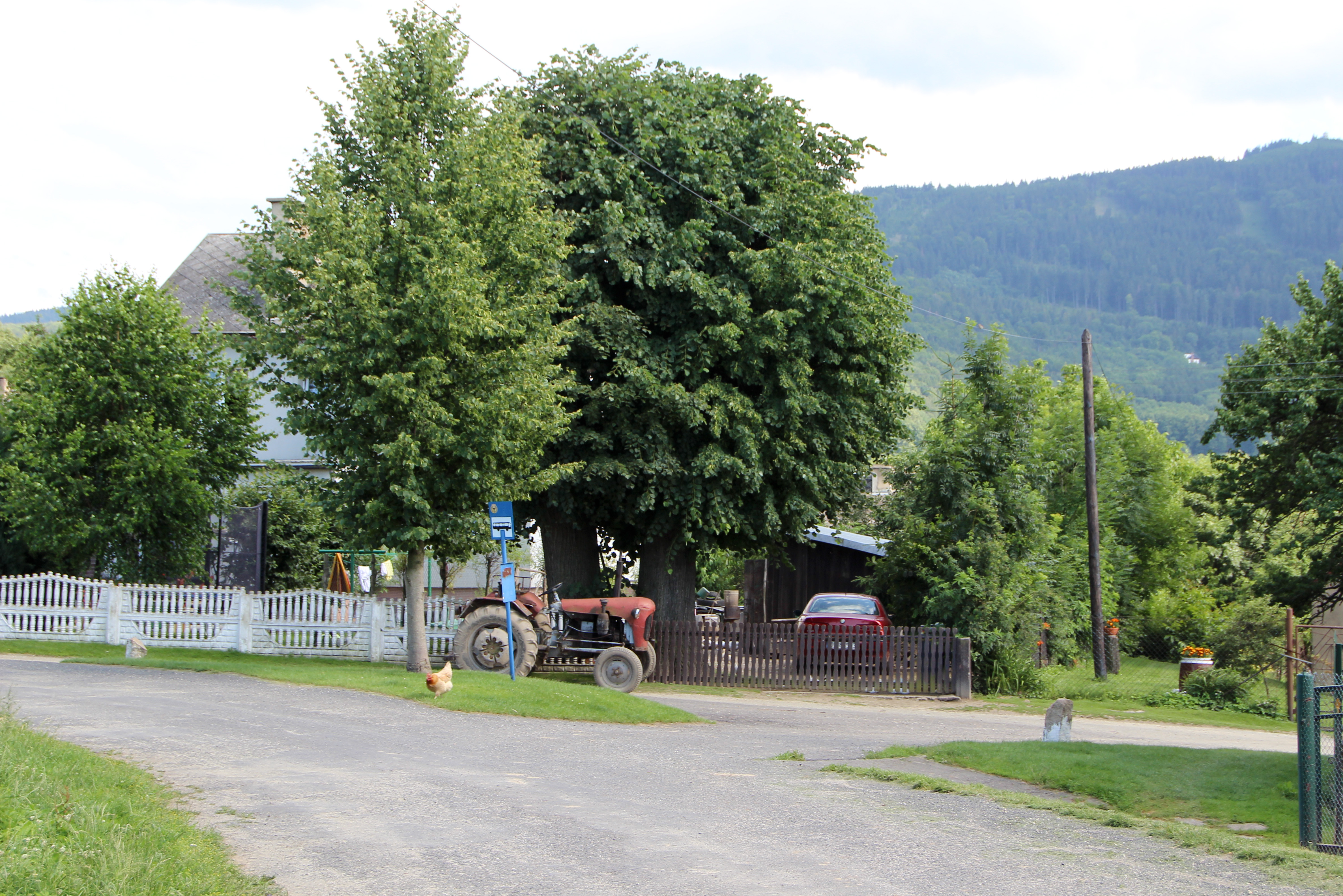 Skowronków (czes. Skřivánkov) - wieś w Polsce w województwie opolskim, w powiecie nyskim w gminie Głuchołazy.